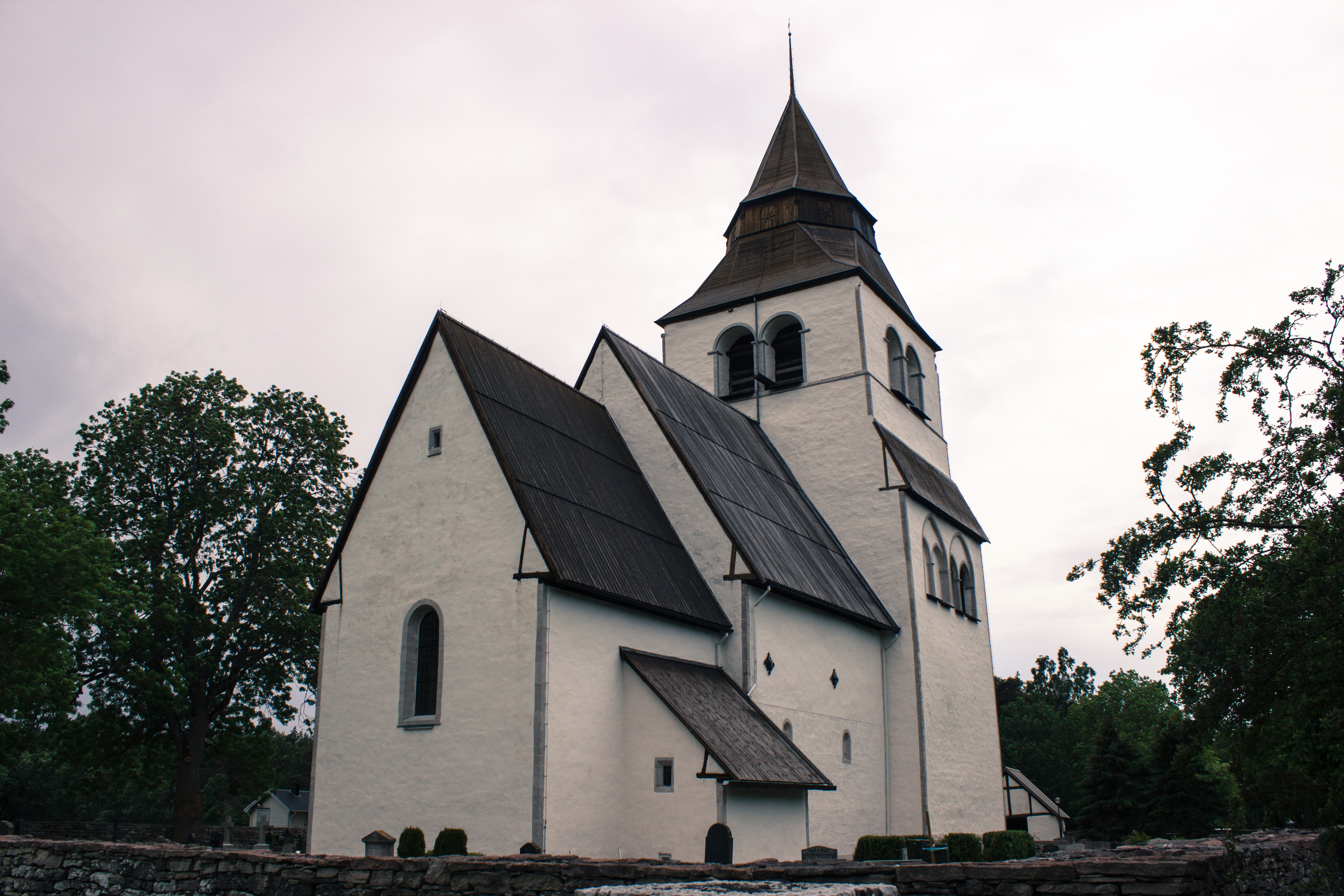 Igrexa de Lokrume, na illa sueca de Gotland.